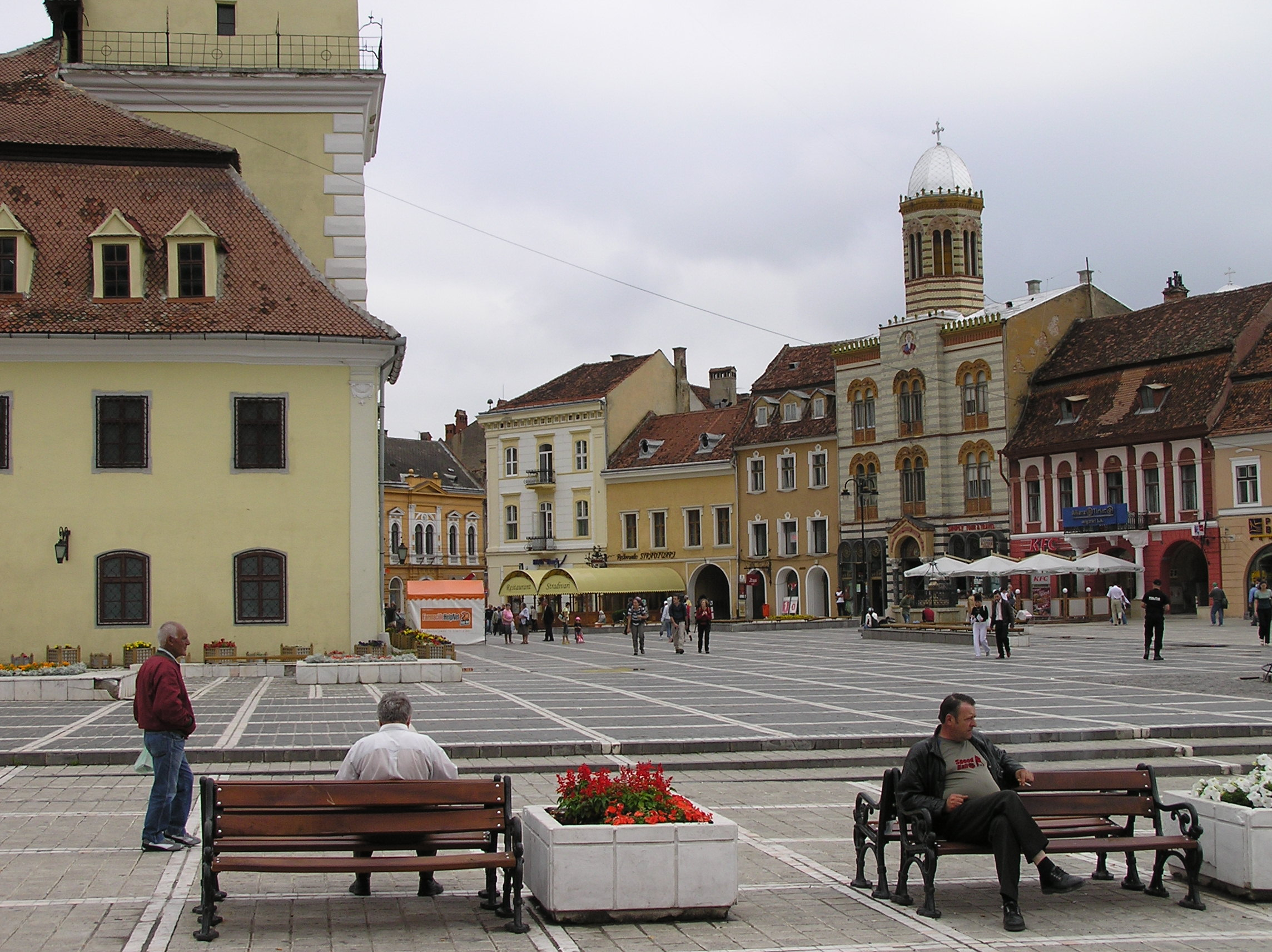 Orthodoxe Kirche am Rathausplatz von Braşov (Kronstadt), Rumänien